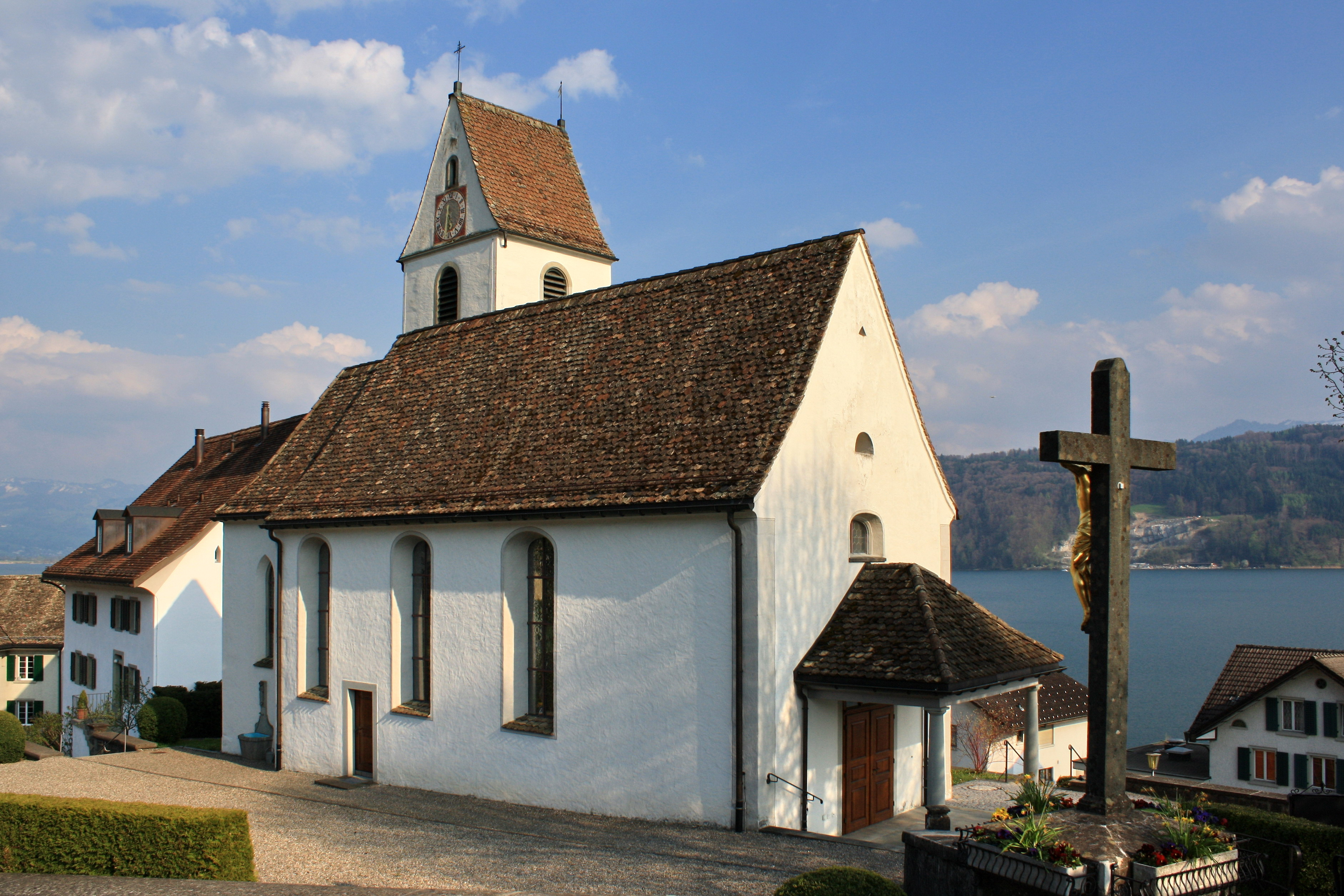 Pfarrkirche St. Pankratius in Bollingen on Obersee (upper Lake Zürich) shore